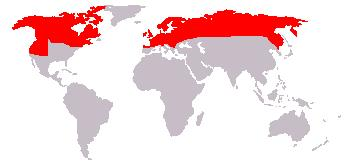 Bewerking afbeelding: Afbeelding_(kaart).JPG